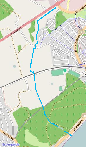 Egebækkens løb